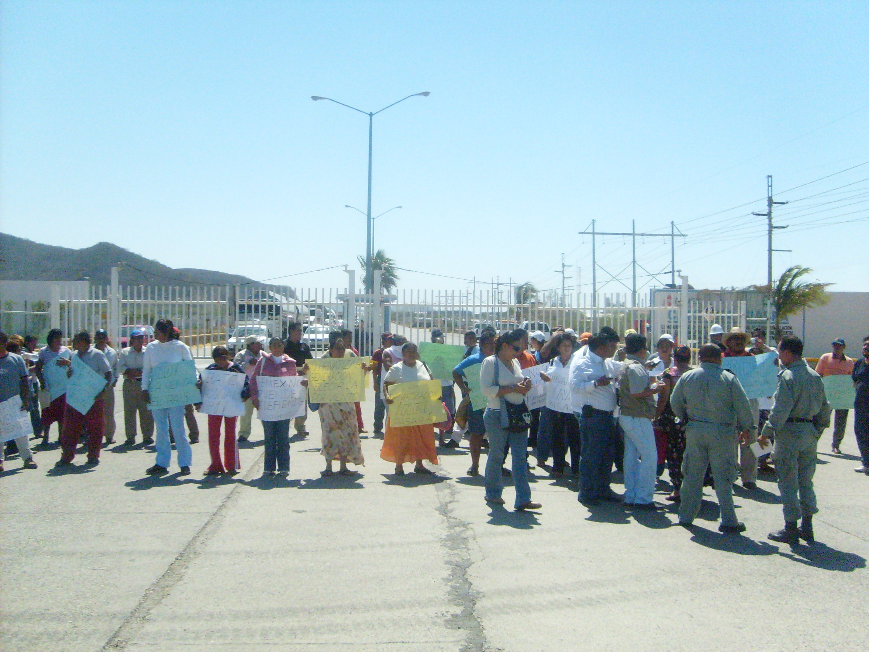 Protesta COCEI AP frente a PEMEX